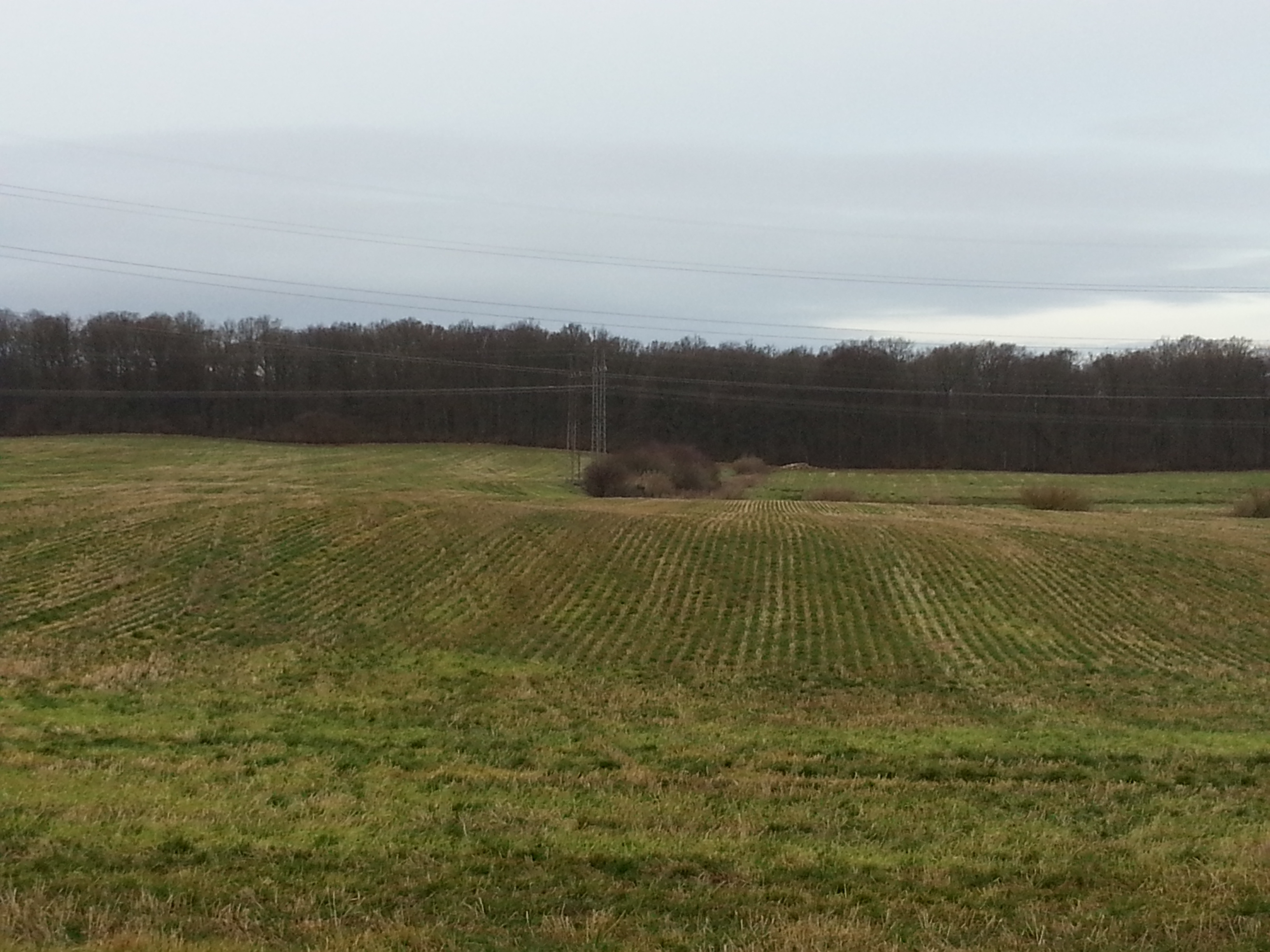 Udsigt mod Krogenberg Hegn fra øst